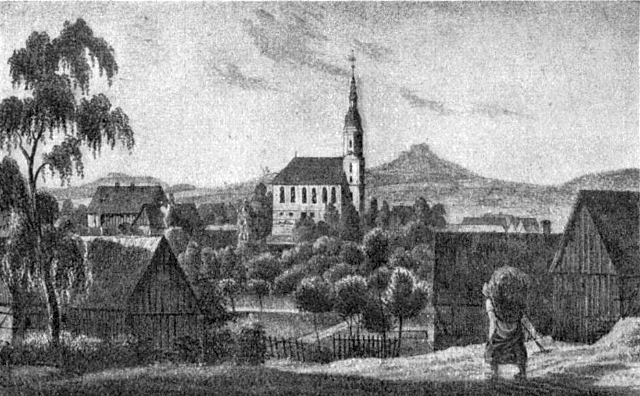 Ansicht von Oberoderwitz um 1840 - Oderwitz